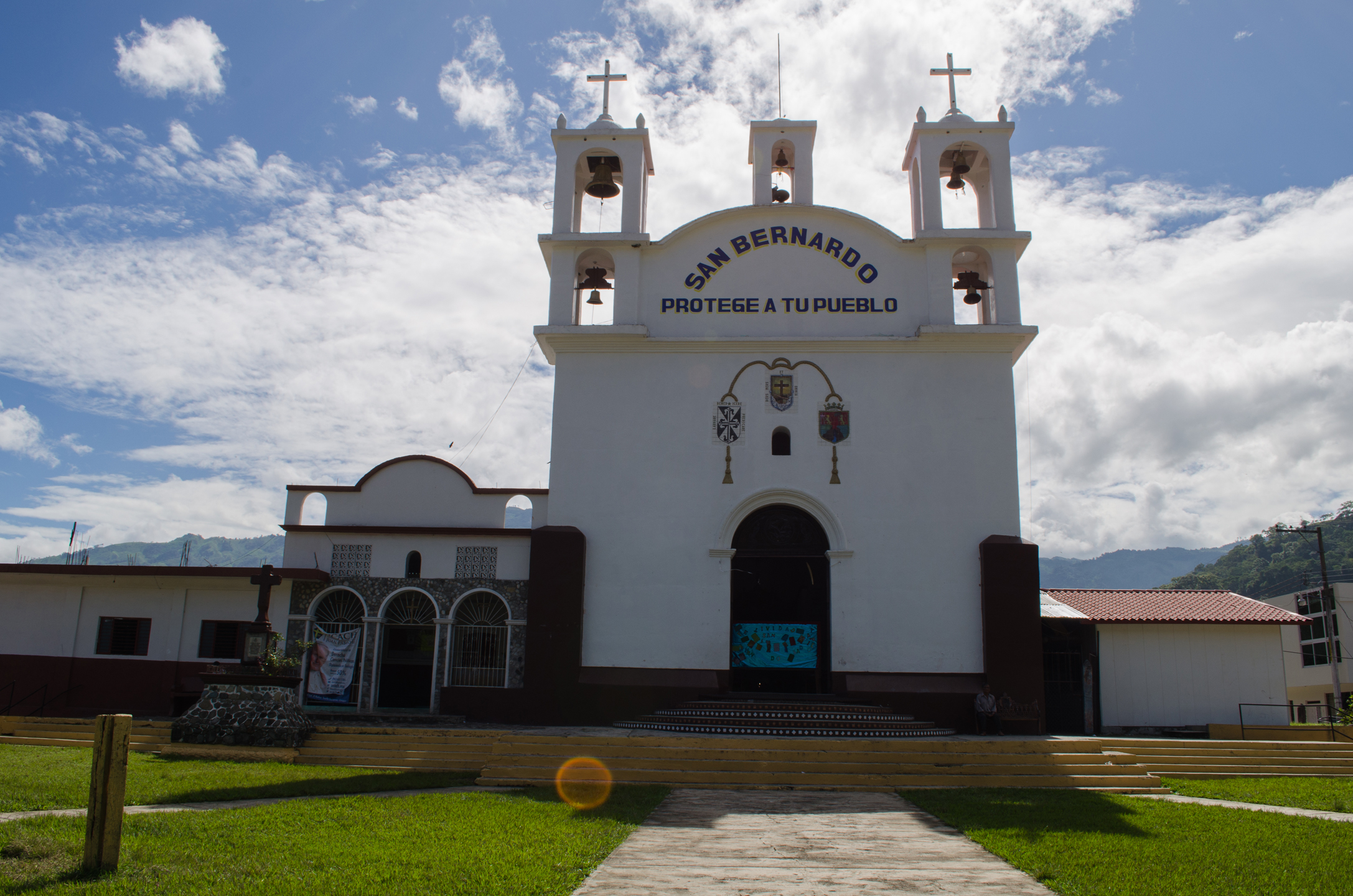 Parroquia de San Bernardo